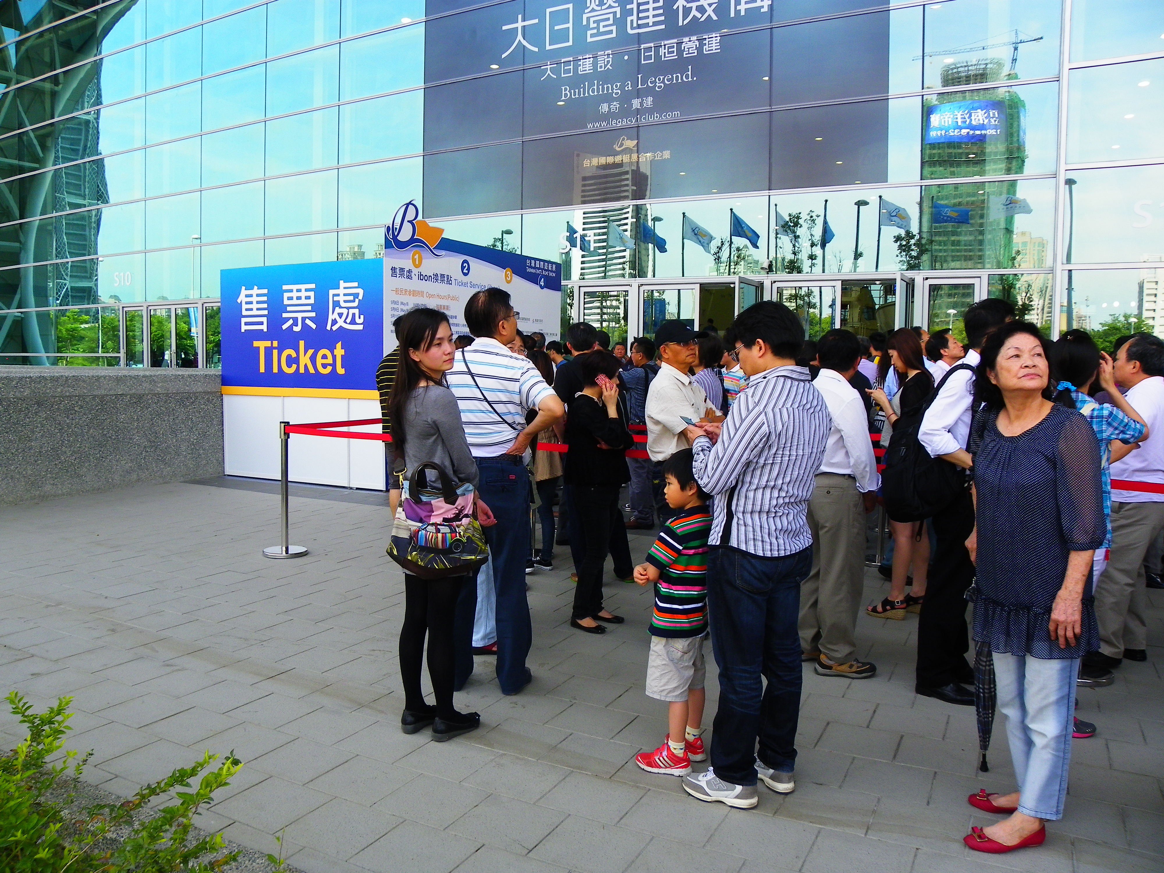 5月8日下午2點一般來賓開放參館時間，高雄展覽館東口外售票處大排長龍。入場券為防水紙製長帶，繫於手腕。